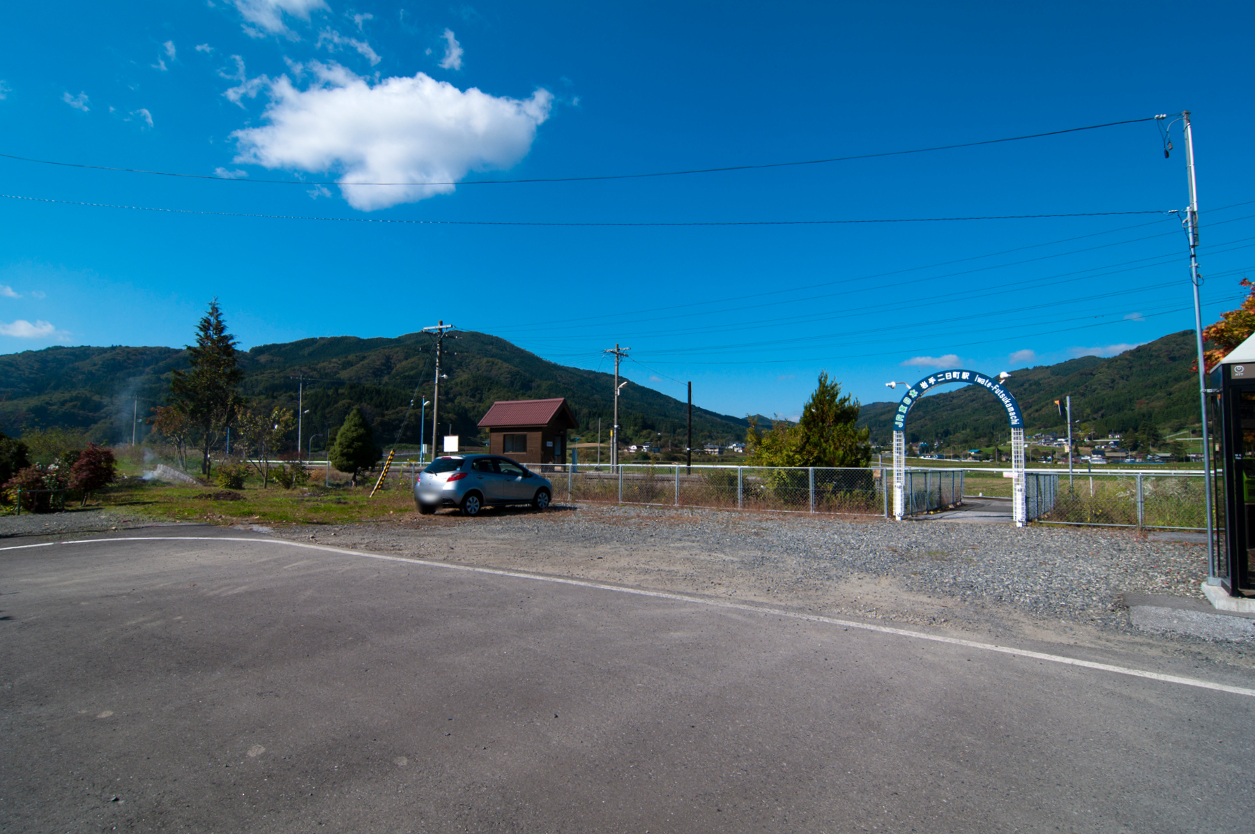 東日本旅客鉄道釜石線岩手二日町駅